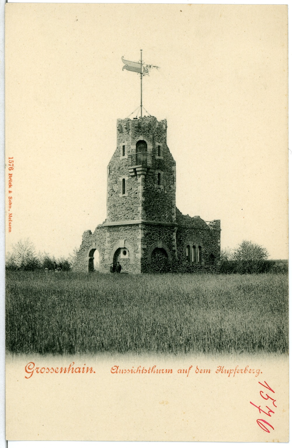 Großenhain; Aussichtsturm auf dem Kupferberg This postcard is from publisher Brück & Sohn in Meißen ( postcard has a unique number 01576 and is available in a higher resolution at the publisher. This images was uploaded in a cooperation project between Wikipedians and the publisher.